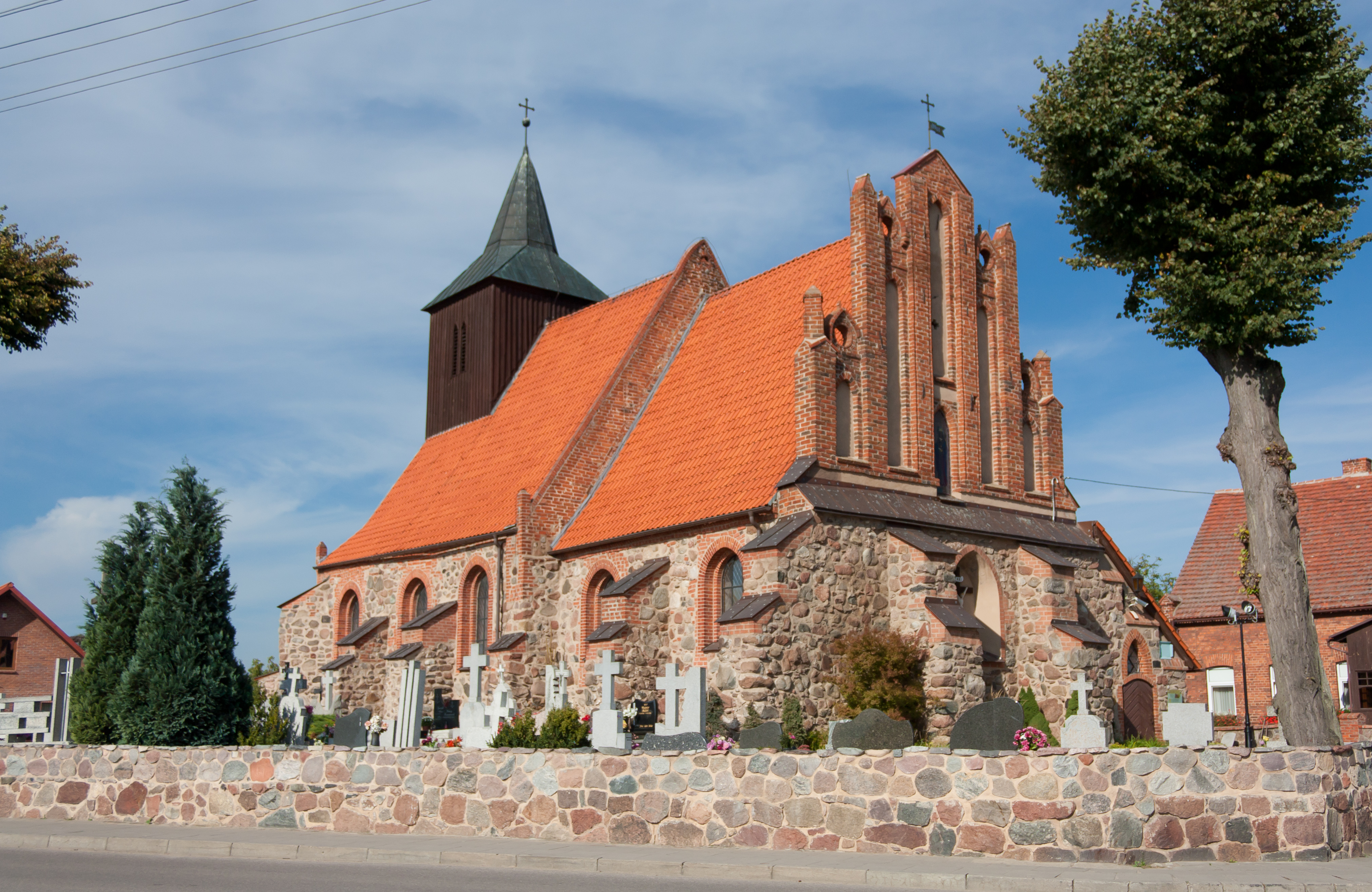 Kokoszkowy, ul. Szkolna 8 - rzymskokatolicki kościół parafialny p.w. Św. Barbary, poł. XIV